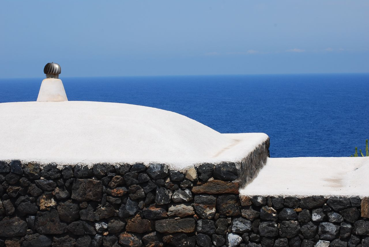 dammuso